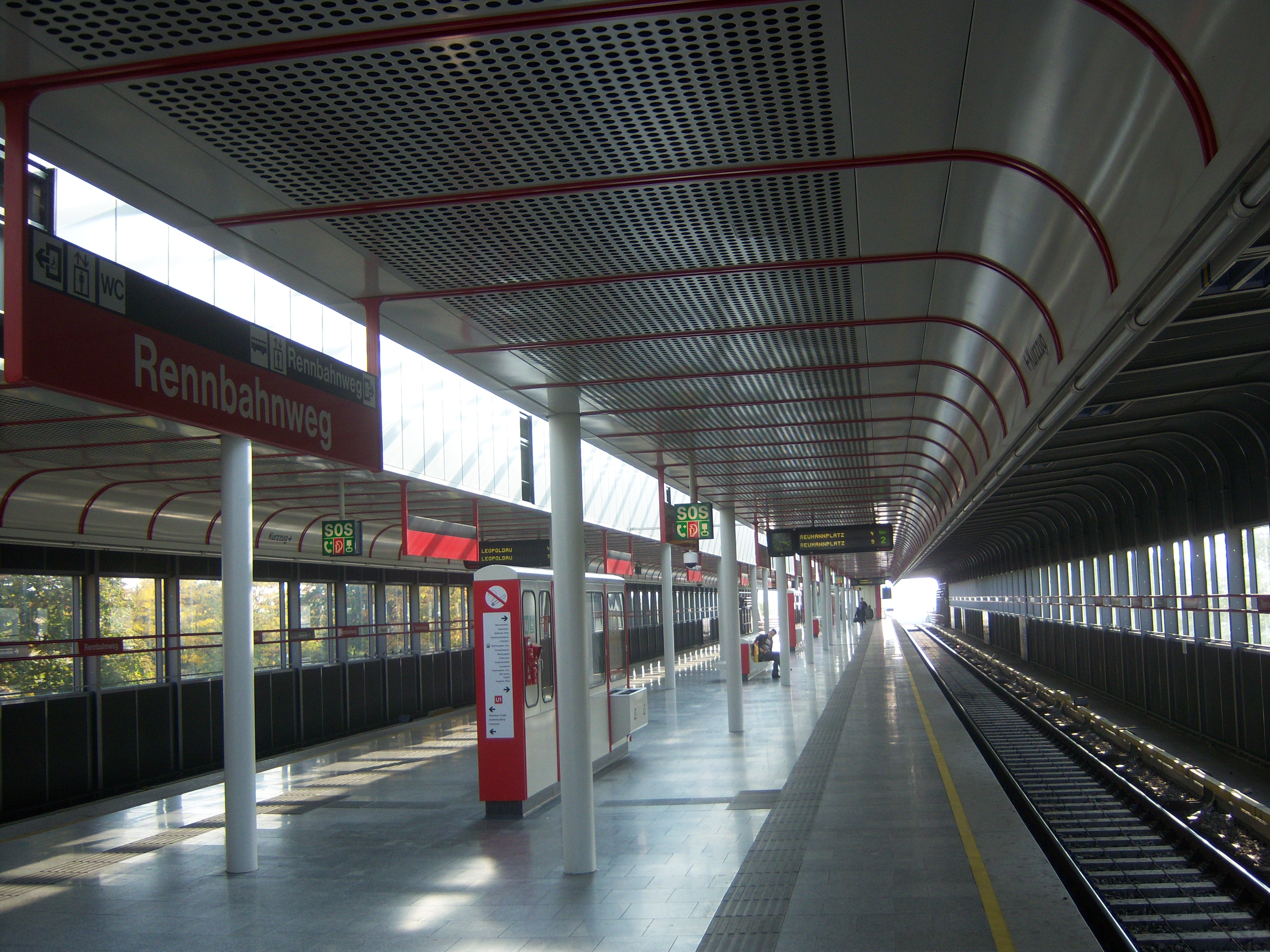 U1-Station Rennbahnweg